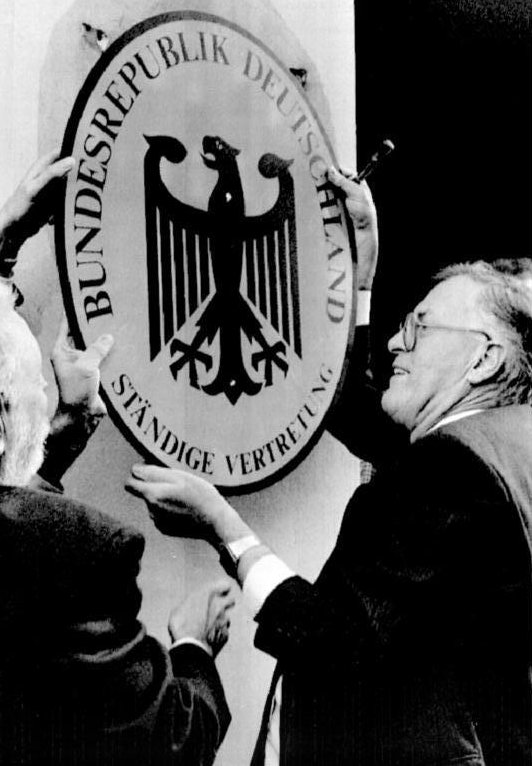 BER-18 / 2.10.90 / Berlin: Vereinigung Franz Bertele, Leiter der Ständigen Vertretung (westliches) Deutschlands in Ostdeutschland, schraubte eigenhändig das Schild an seinem Dienstgebäude ab. Mit der Vereinigung beendet die Mission ihre Arbeit.